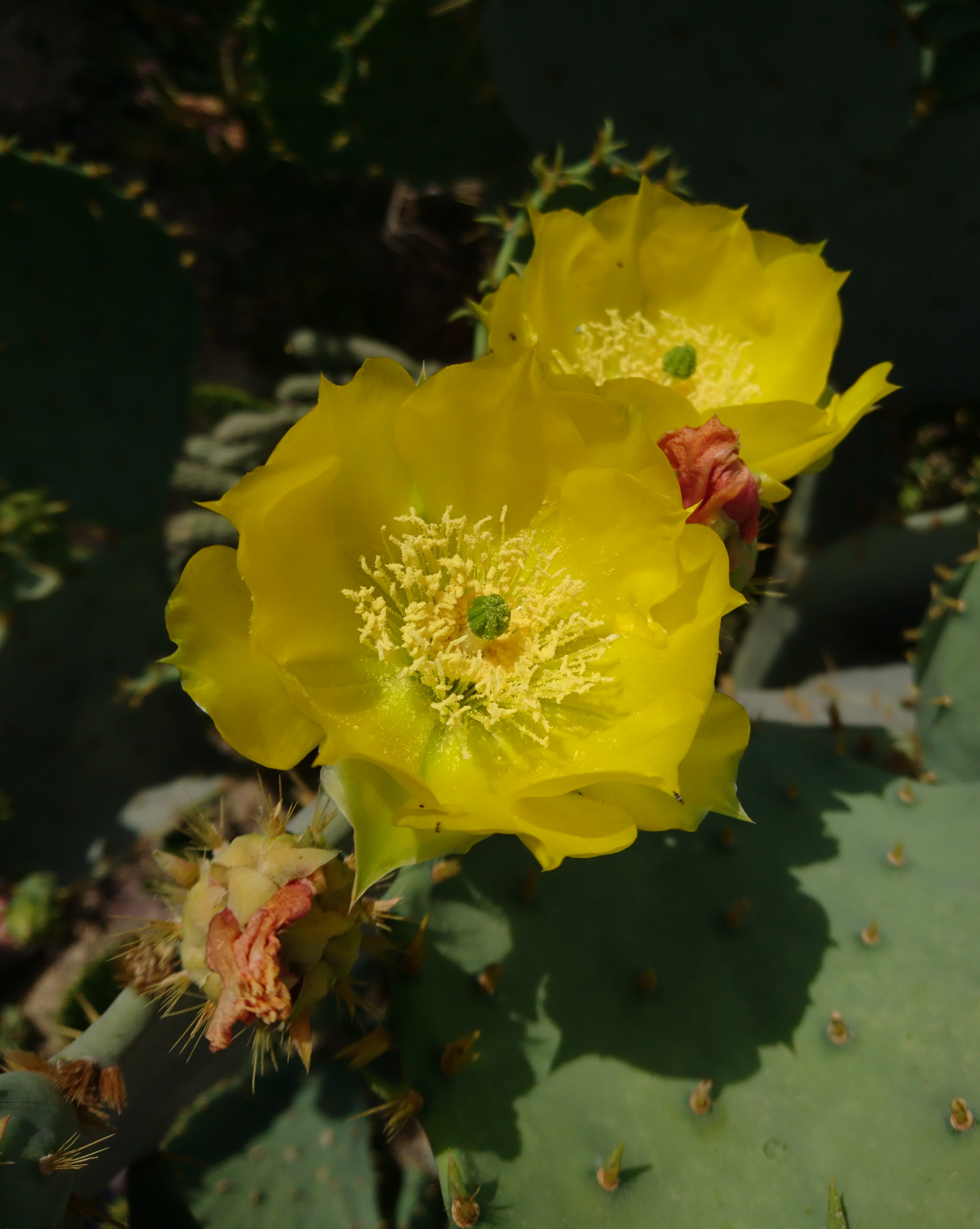 Opunita Cactus Behbahan